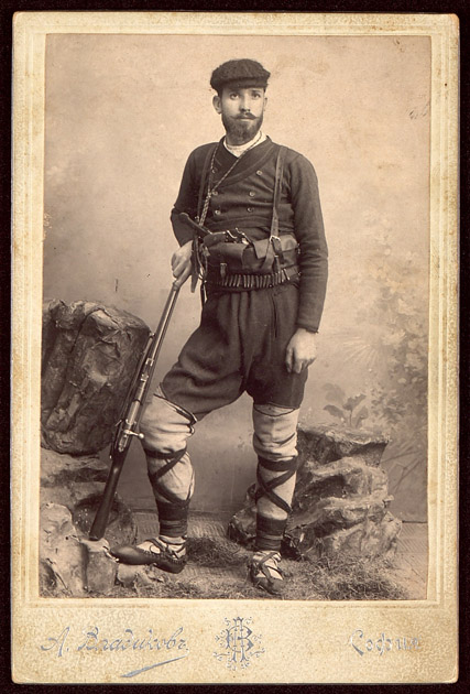 Коста Нунков.